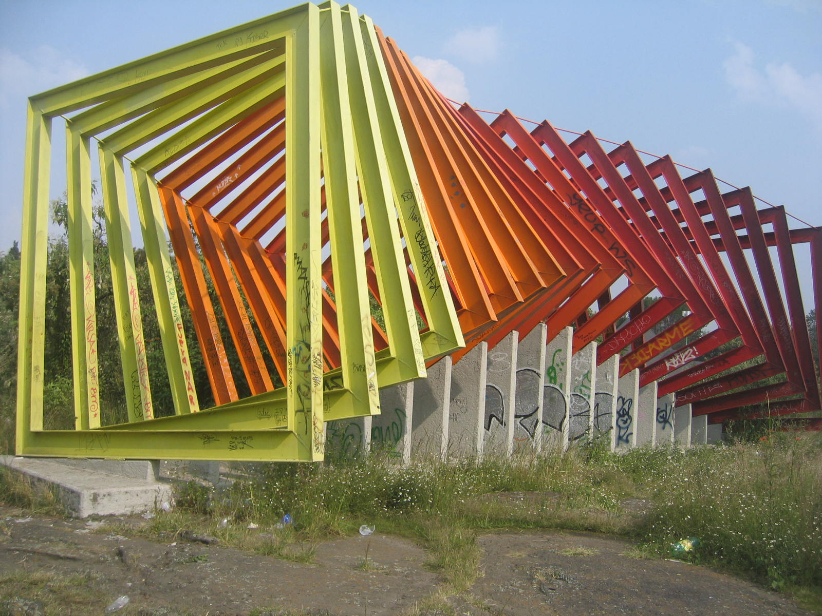 Cóatl, de Helen Escobedo, en el Espacio escultórico de la UNAM